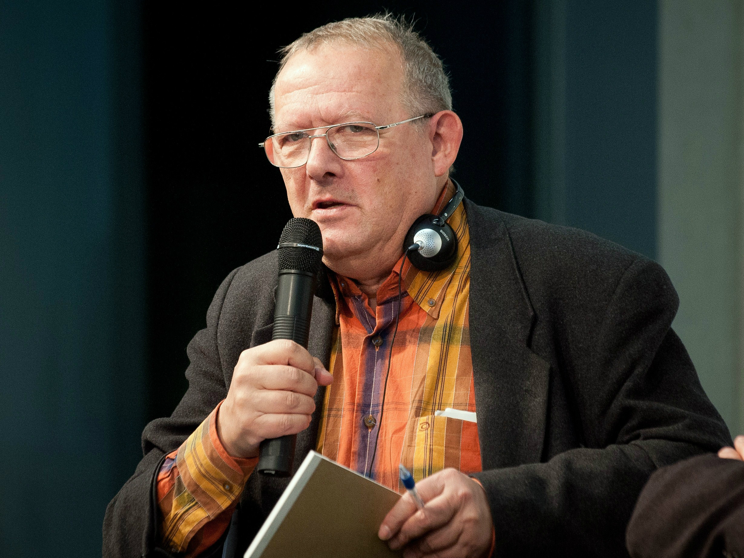 Adam Michnik, (Essayist und Publizist) Foto: Stephan Röhl Podiumsdiskussion „Mehr Europa wagen. Eine Intervention“. Heinrich-Böll-Stiftung in Kooperation mit dem Institut Français Berlin Mit André Glucksmann, Philosoph und Publizist Adam Michnik, Essayist und Publizist Peter Schneider, Schriftsteller Daniela Schwarzer, Stiftung Wissenschaft und Politik Moderation: Ralf Fücks, Vorstand, Heinrich-Böll-Stiftung